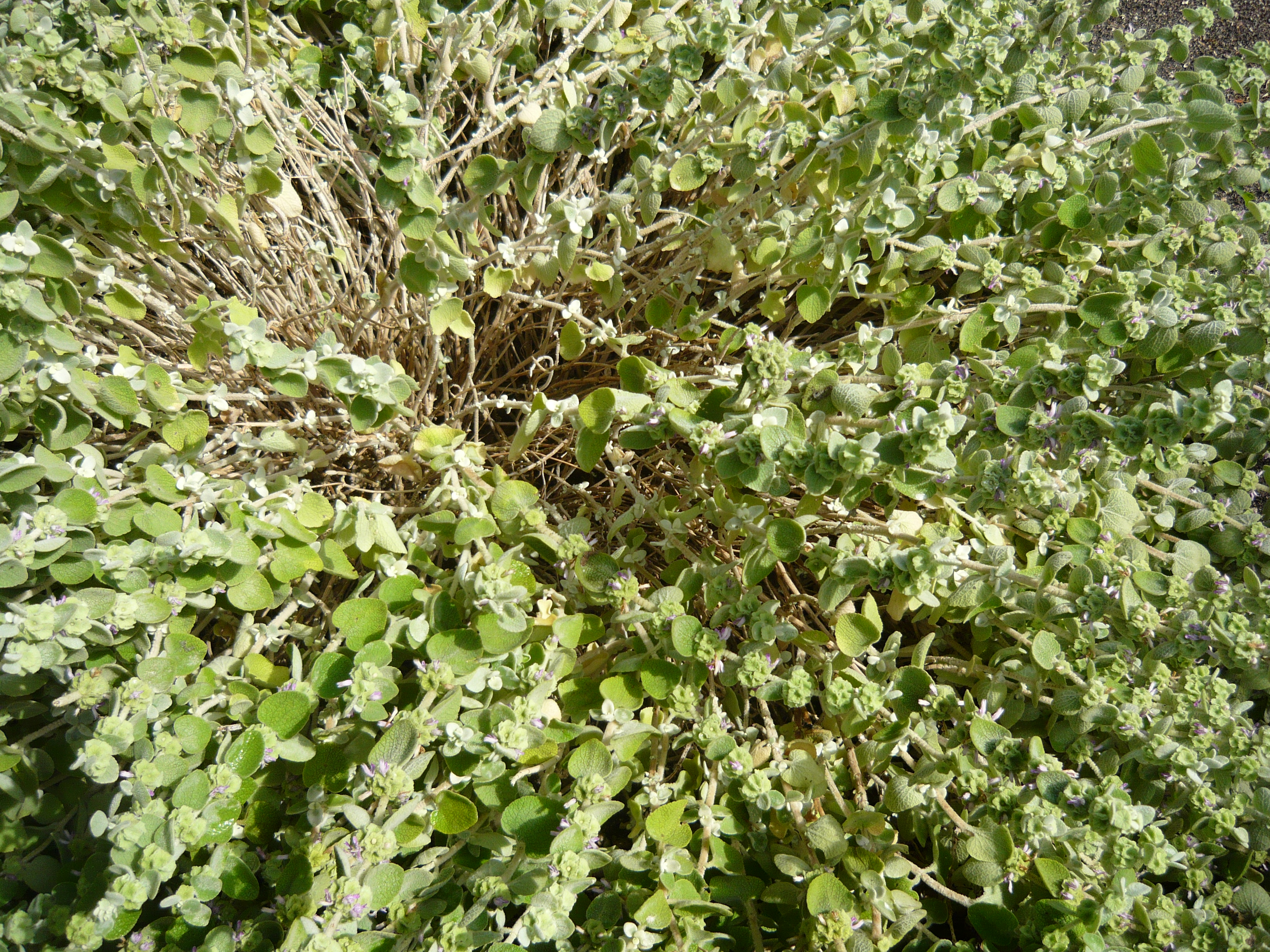 Ballota acetabulosa. Real Jardín Botánico, Madrid, España.